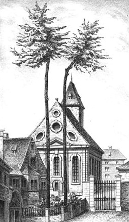 Eglise Sainte-Aurélie de Strasbourg